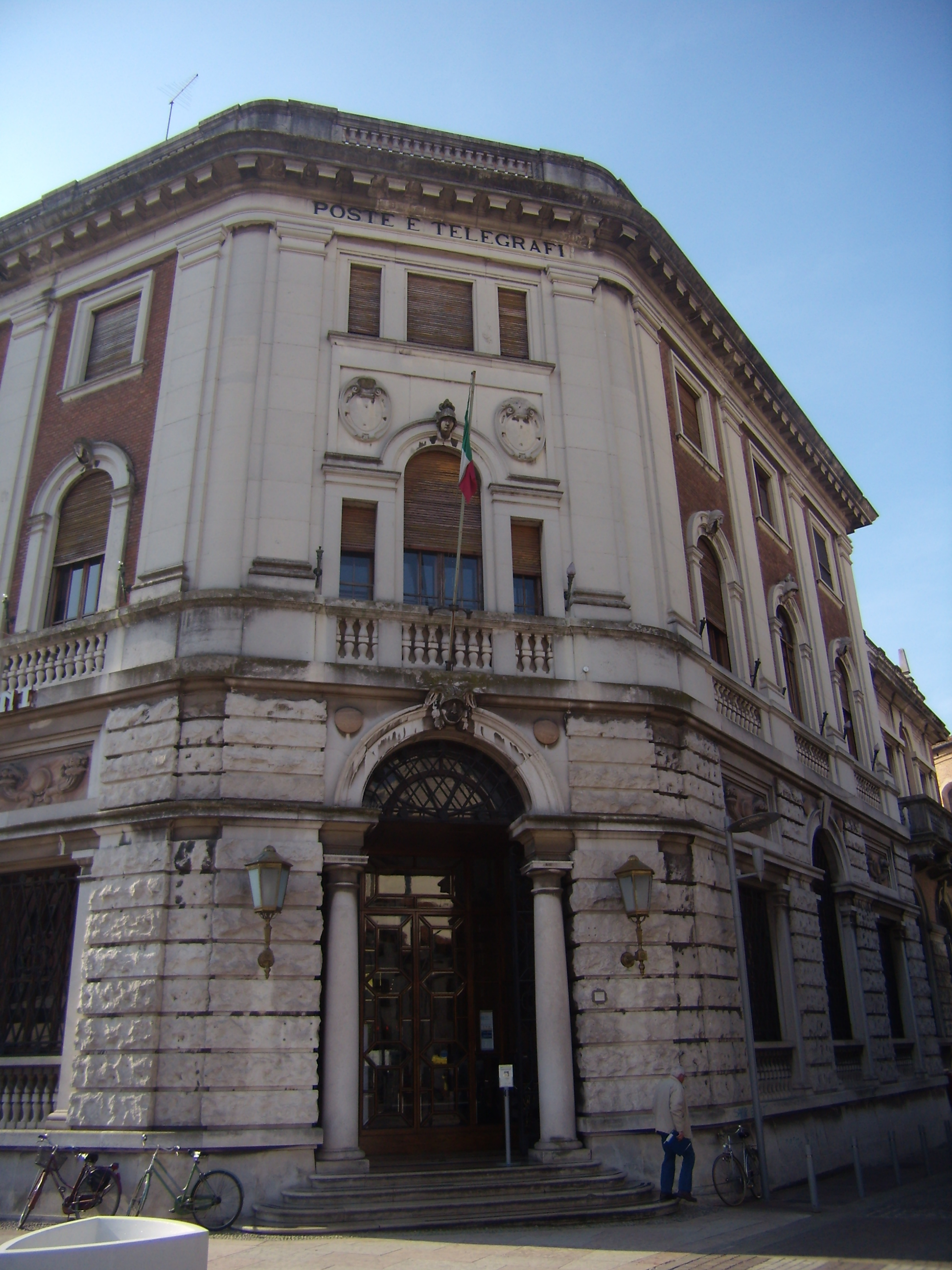 Poste Centrali Rovigo opera architetto Roberto Narducci Poste Centrali Rovigo, Italy - architect Roberto Narducci